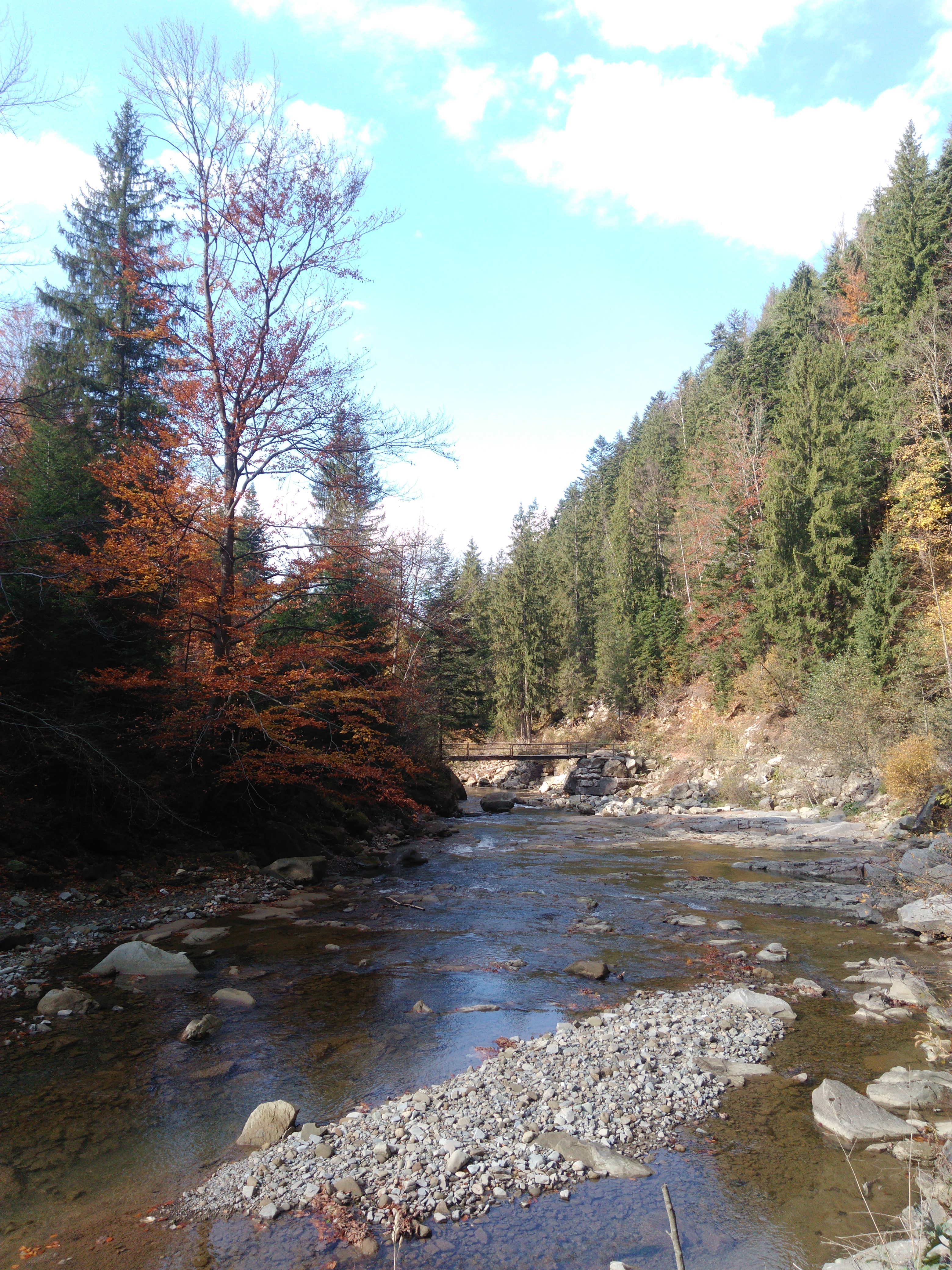 Прутець Чемегівський в середній течії в селі Микуличин.